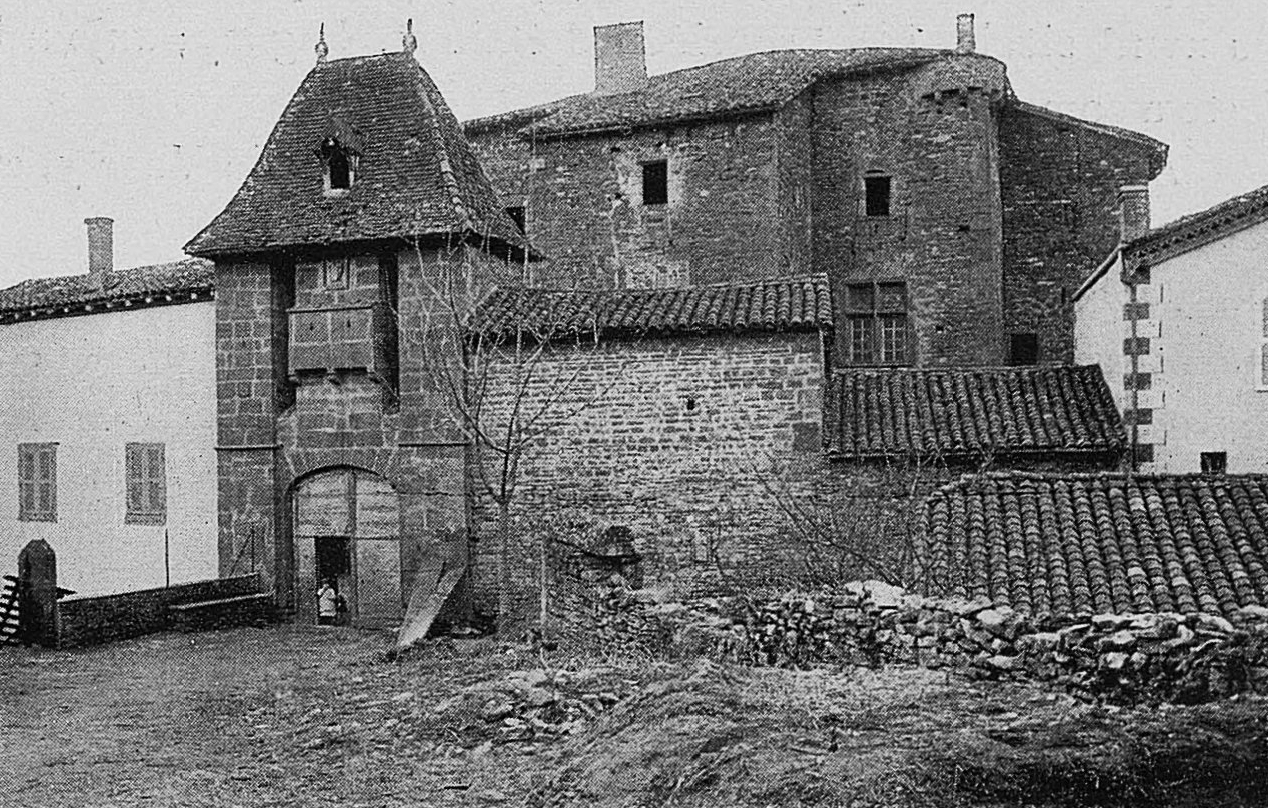 Dictionnaire illustré des communes du département du Rhône. Tome 1 / par MM. E. de Rolland et D. Clouzet.